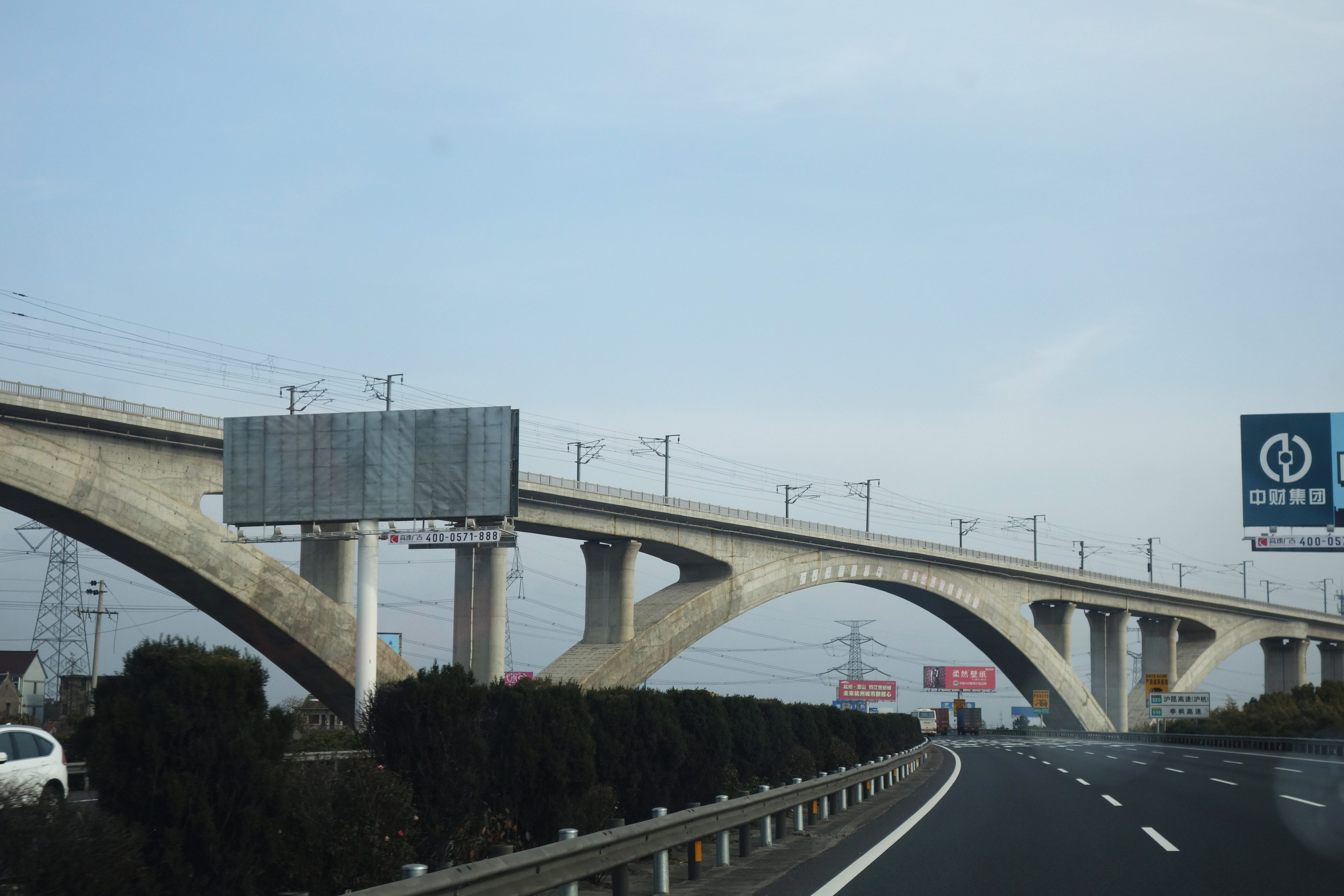 沪杭高铁跨越沪昆高速公路